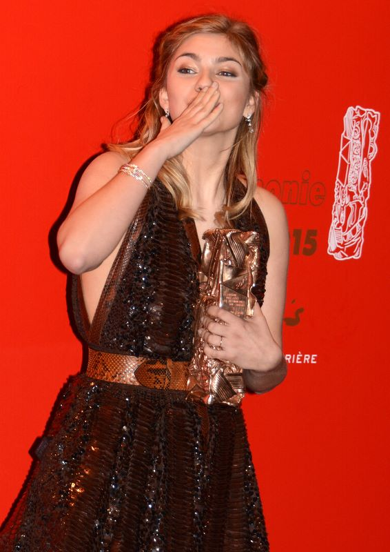 Louane Emera à la cérémonie des César